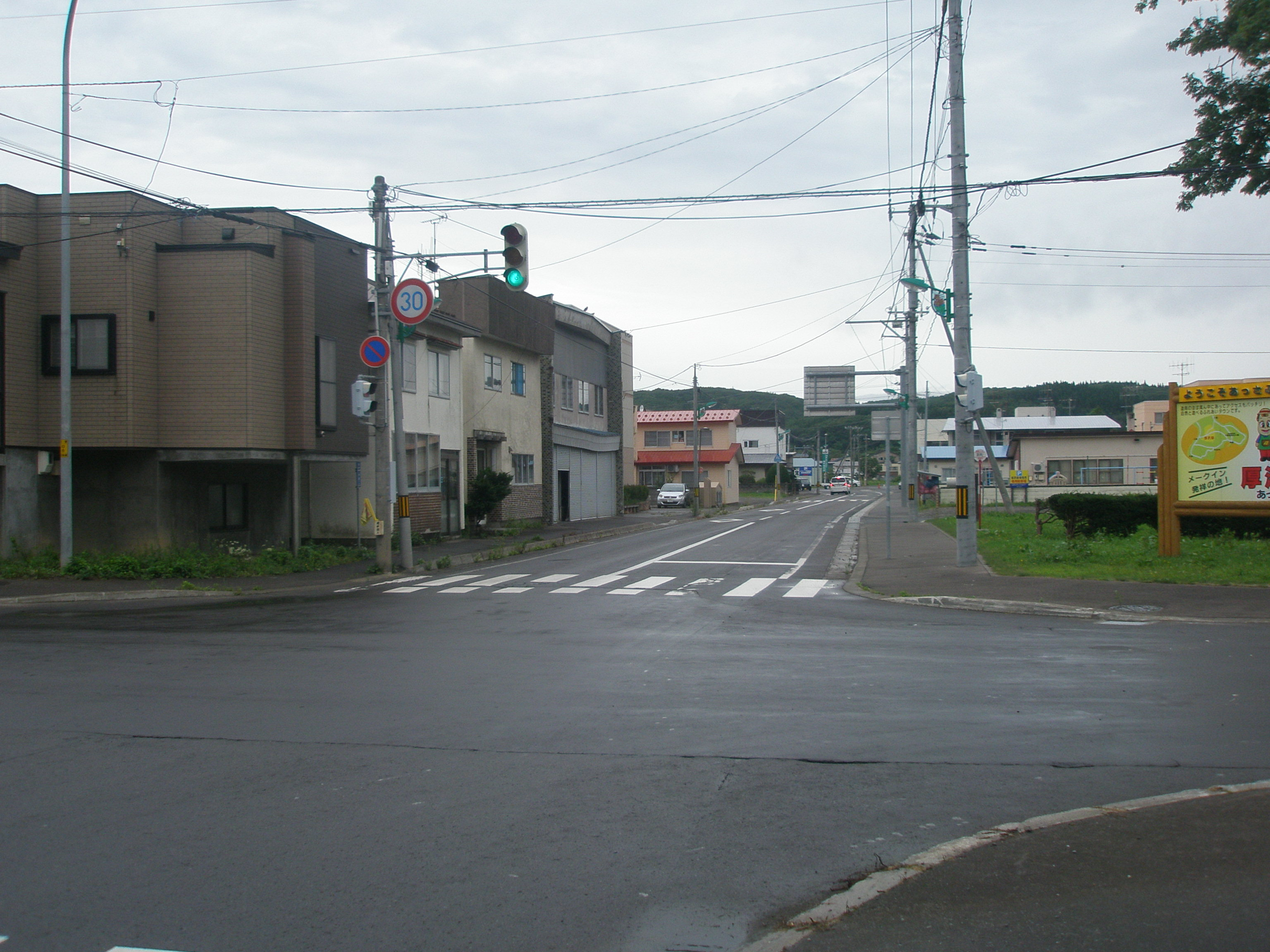 北海道道460号乙部厚沢部線・終点及び北海道道67号八雲厚沢部線の交差点部-4（北海道道67号八雲厚沢部線側から）